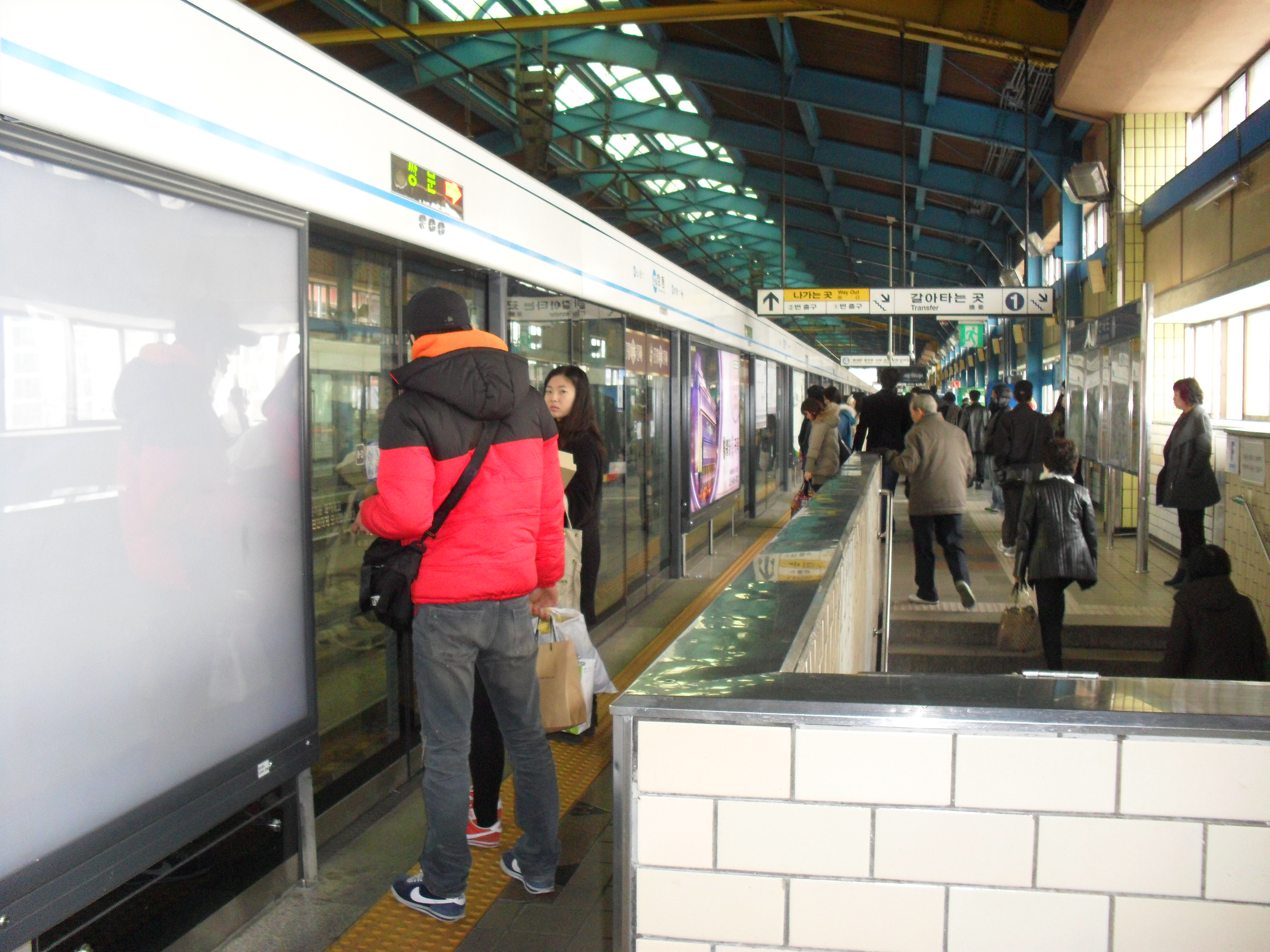 4号線倉洞駅 ホーム